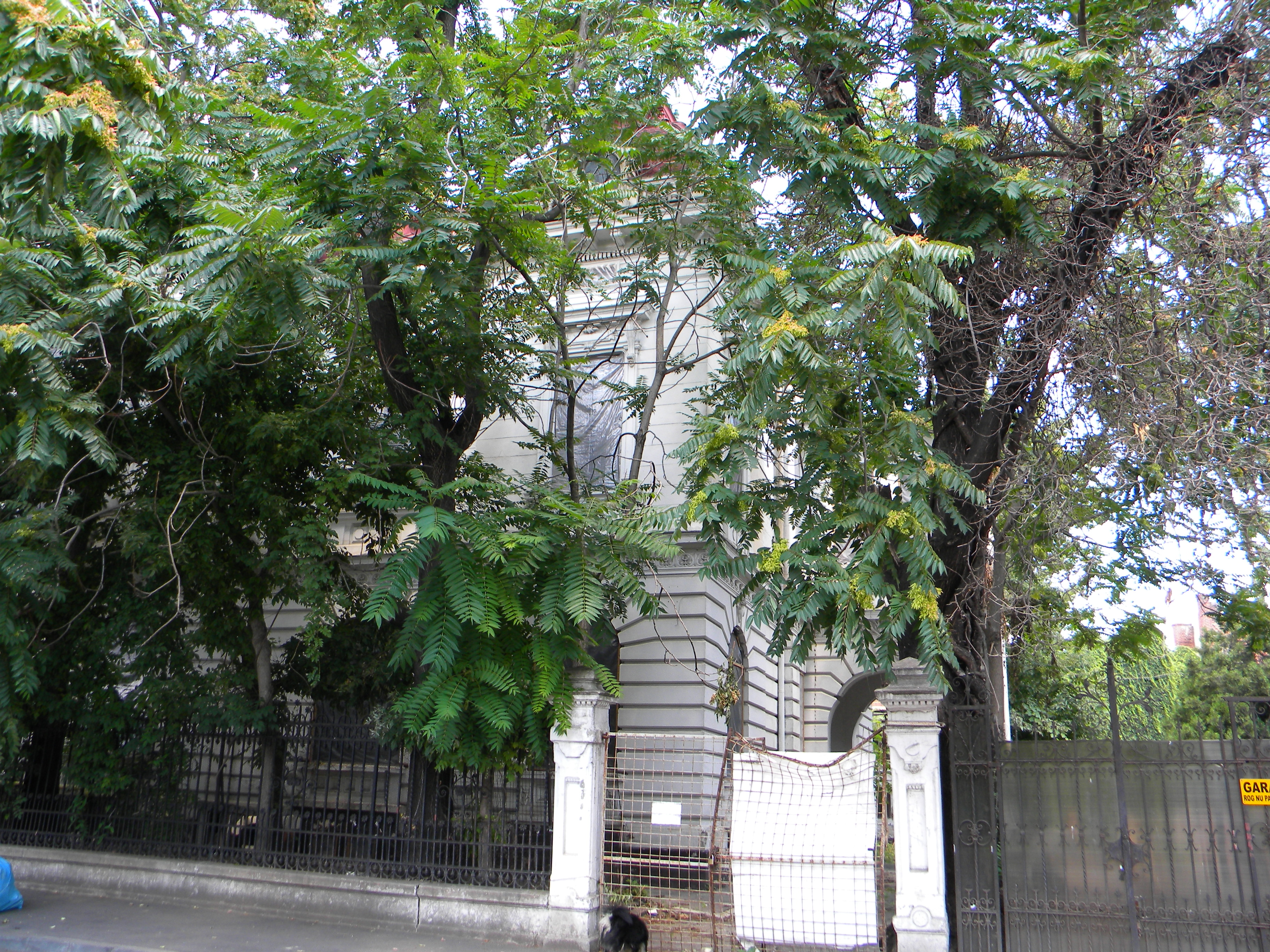 Bucuresti, Romania, Str. Batistei nr. 27-27A; Casa Boamba-Rahtivanu; B-II-m-B-21024 (2)